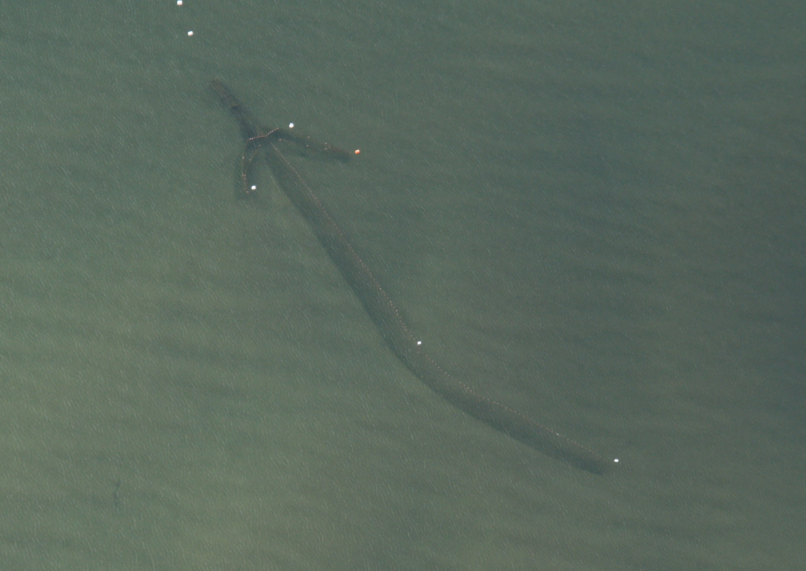 Trappnetz im Bodensee. Vorbildlich markiert. Luftaufnahme